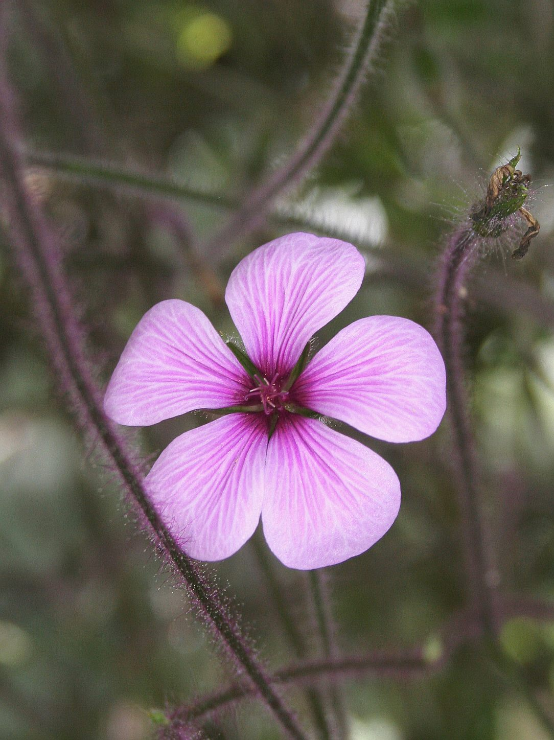 Geranium maderense Conservatoire botanique national de Brest, France, juin 2007